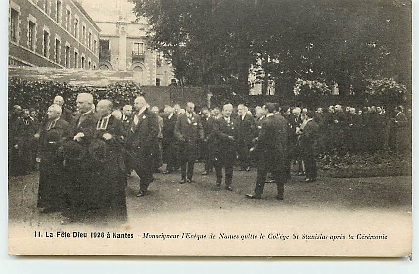 Procession de la Fête Dieu à Nantes en 1926, en présence de Template:Mgr de La Motte.